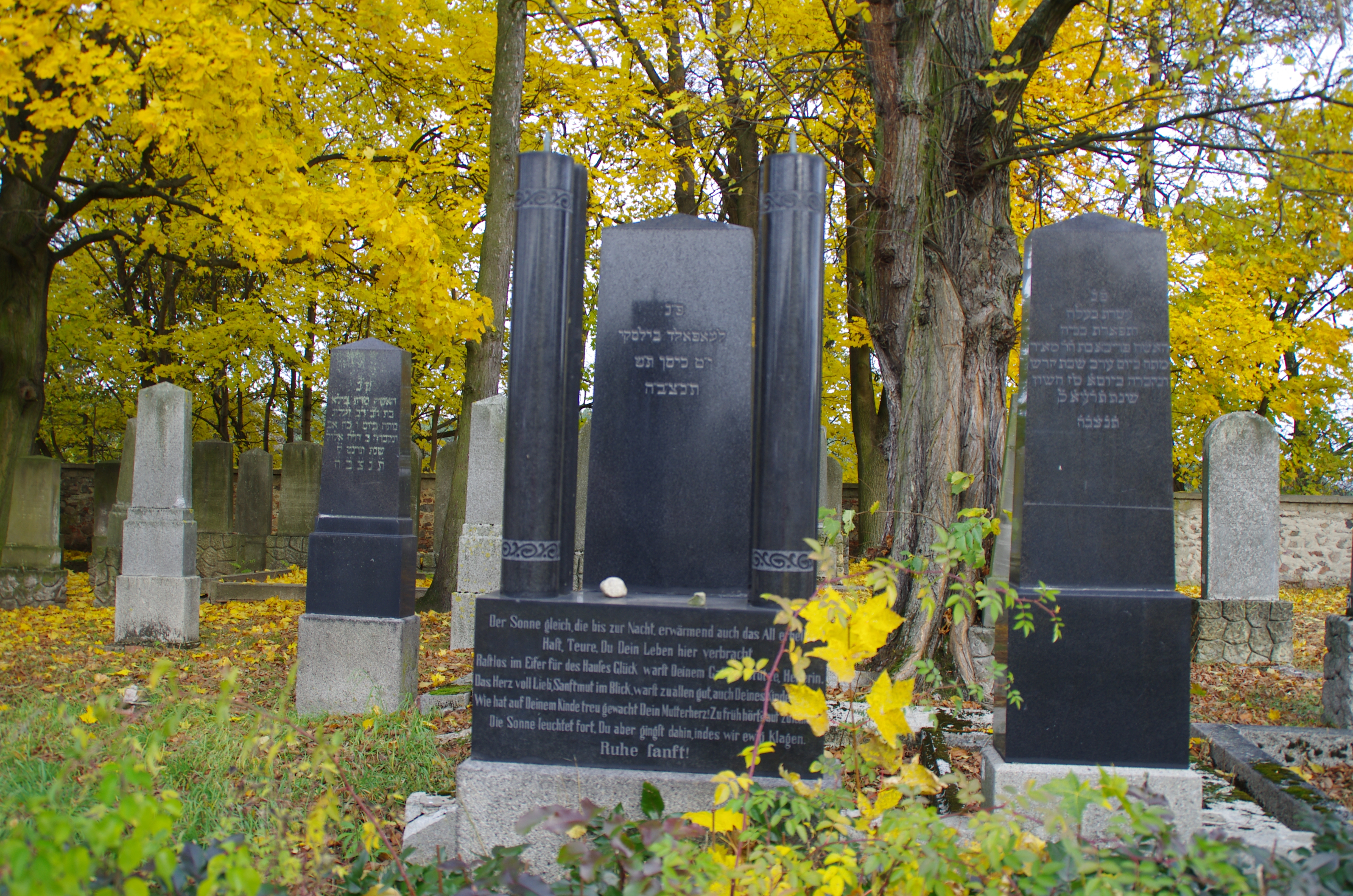 Wriezen in Brandenburg. Der Friedhofe wurde 1730 gegründet, die letzte Belegung fand 1940 statt. Der Friedhof steht unter Denkmalschutz.